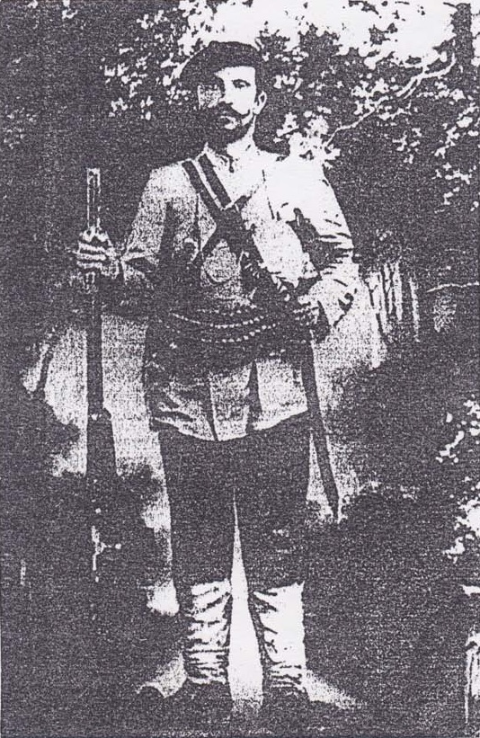 Симеон Сиин